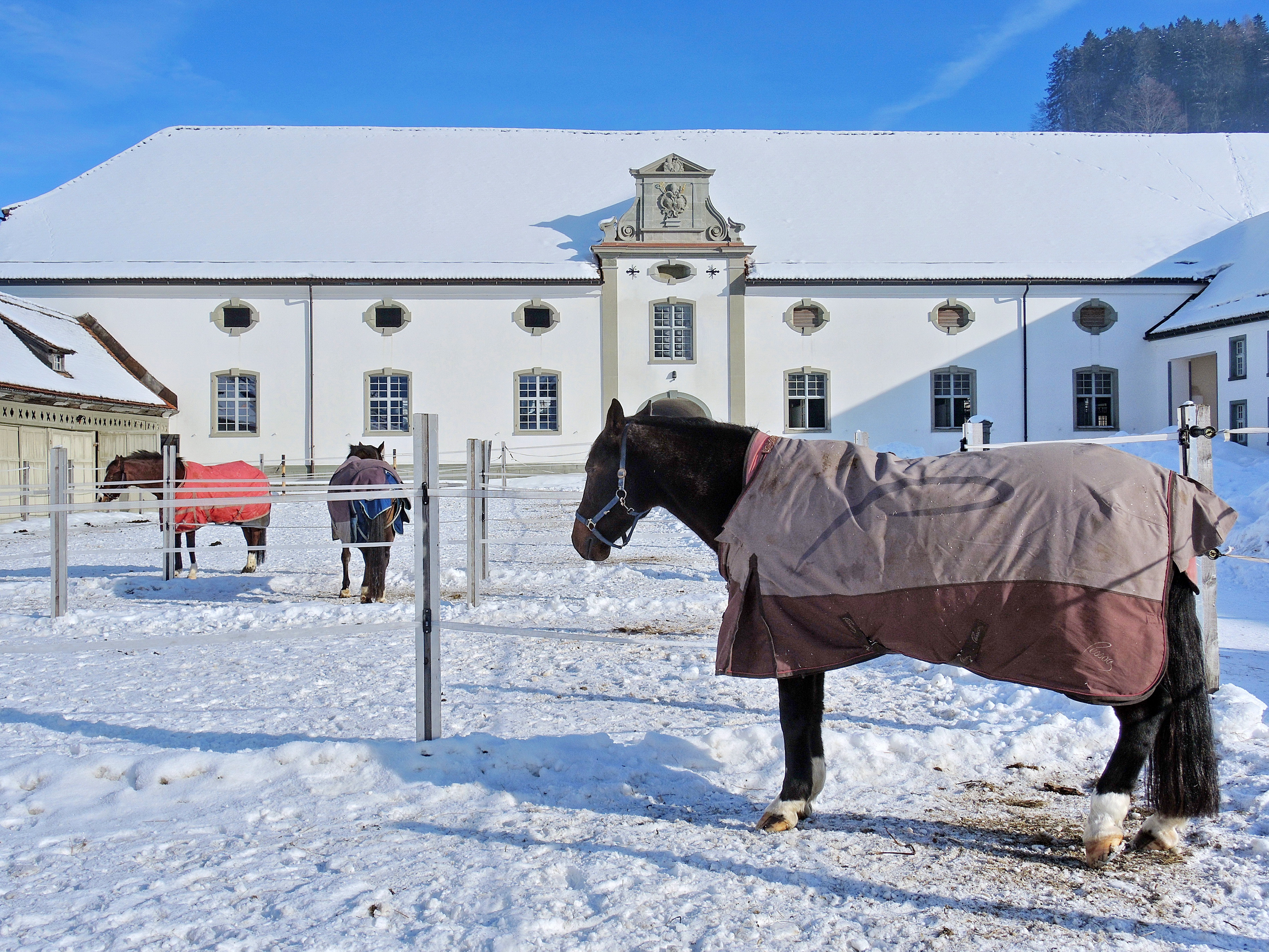 Cavalli della Madonna, Marstall, Kloster Einsiedeln in Einsiedeln (Switzerland)